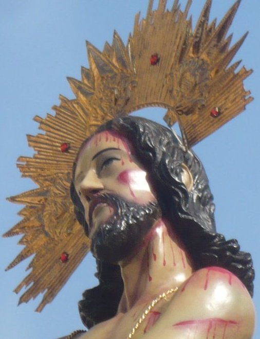 Columna foto